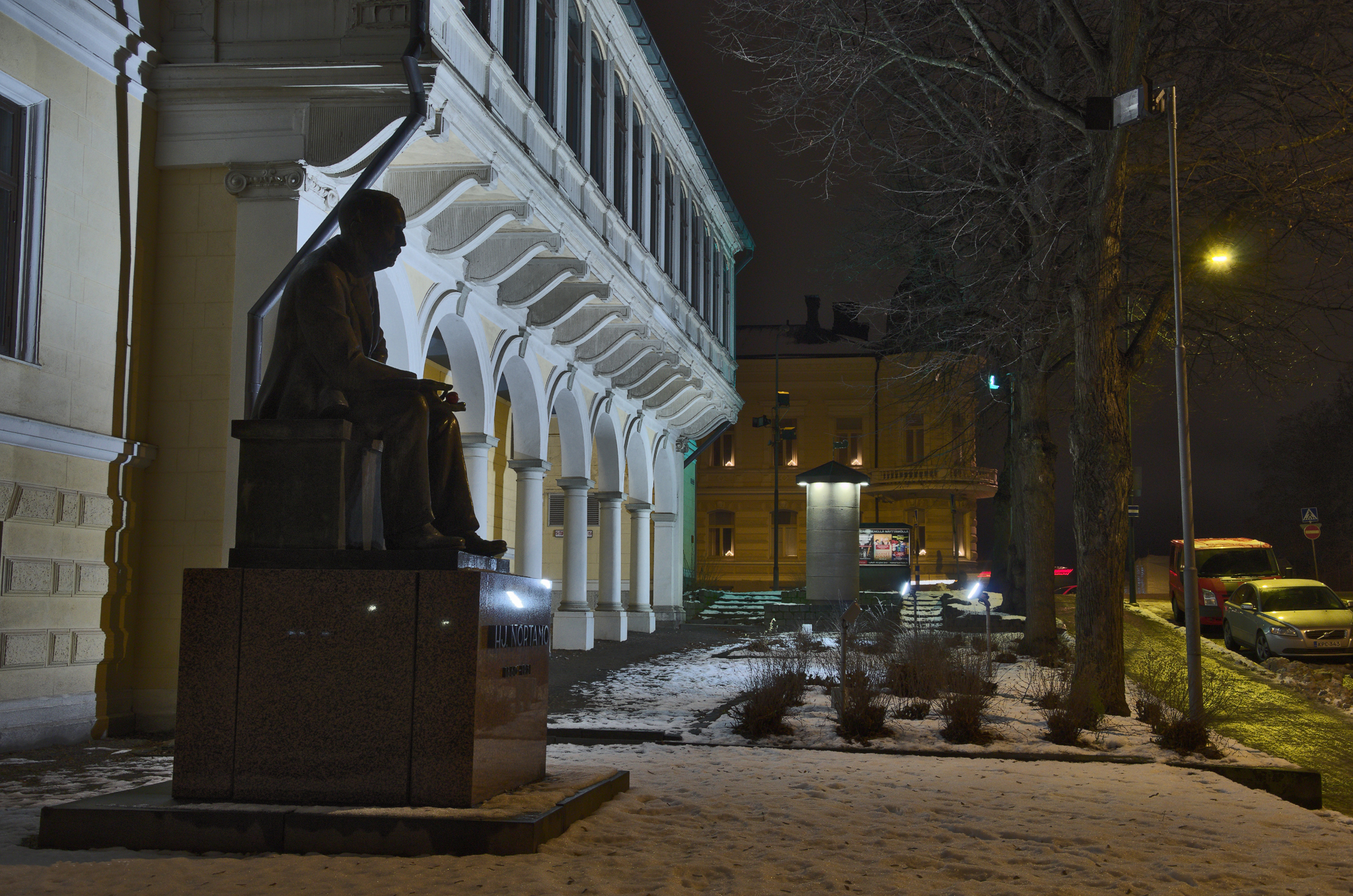 Hj. Nortamo Nortamo' (Q21803294)